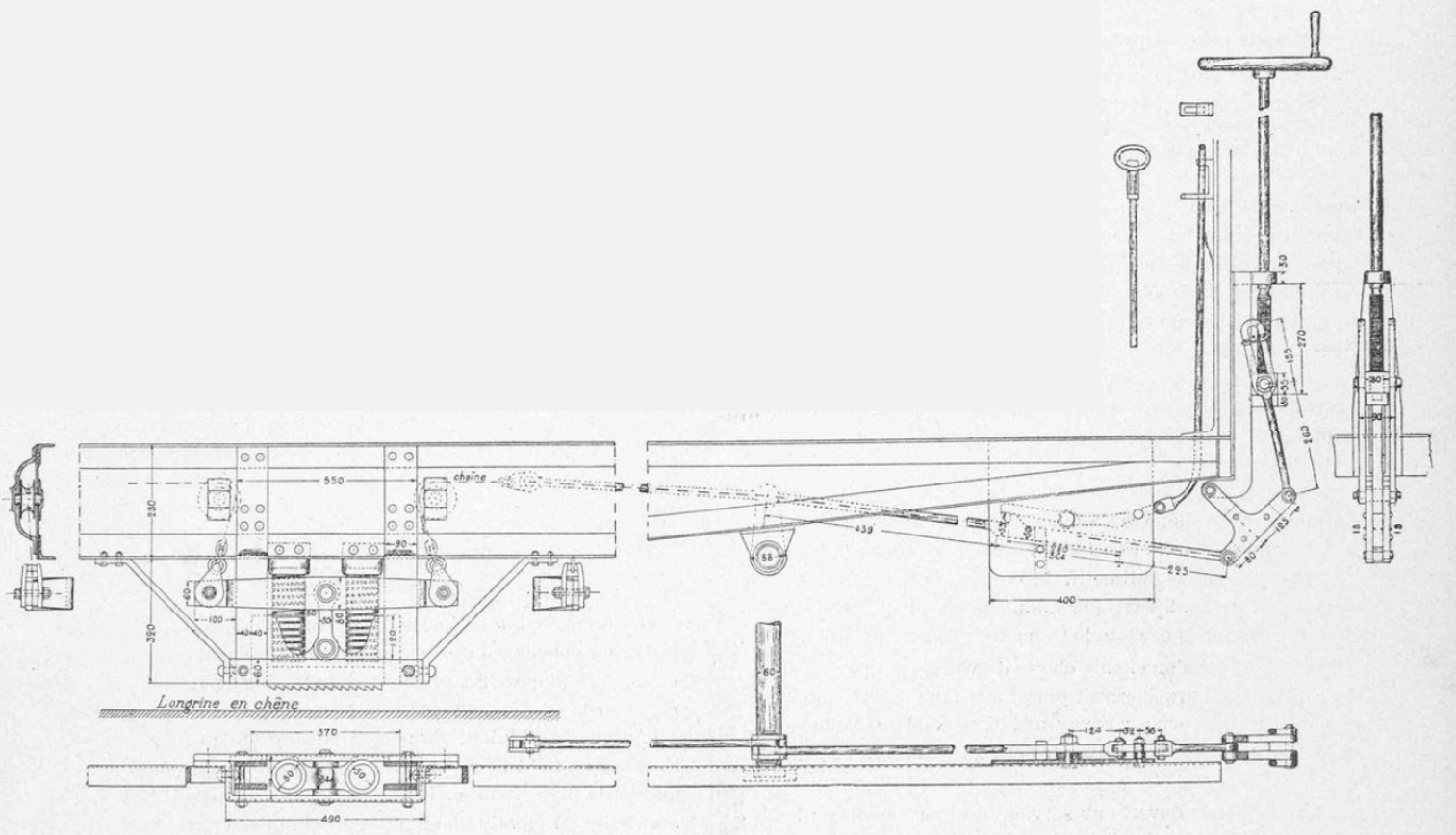 Frein de sûreté des voitures de la ligne de la Pontaise